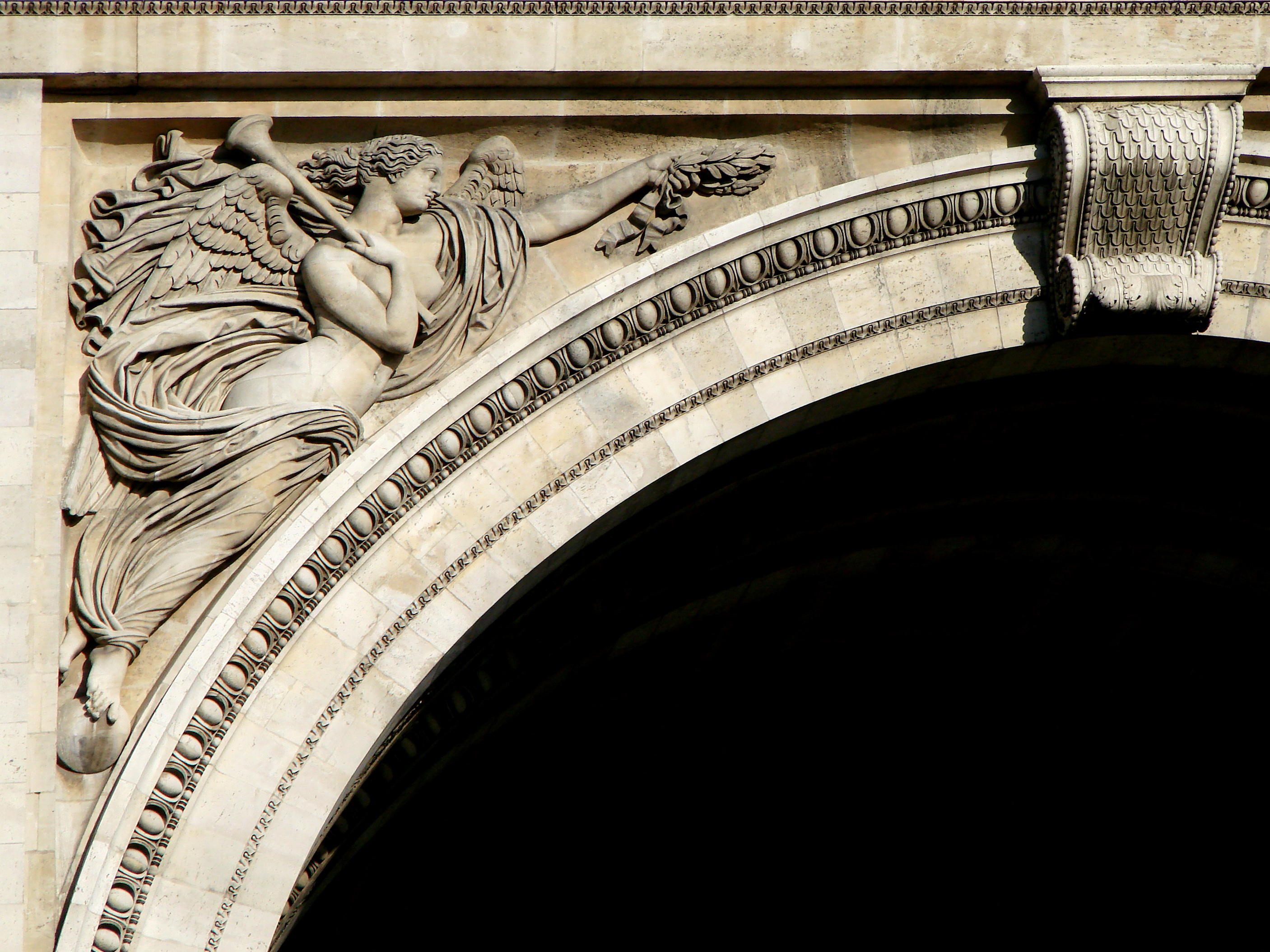 L'Arc de Triomphe à Paris, vu depuis l'Avenue de la Grande-Armée: Victoire.